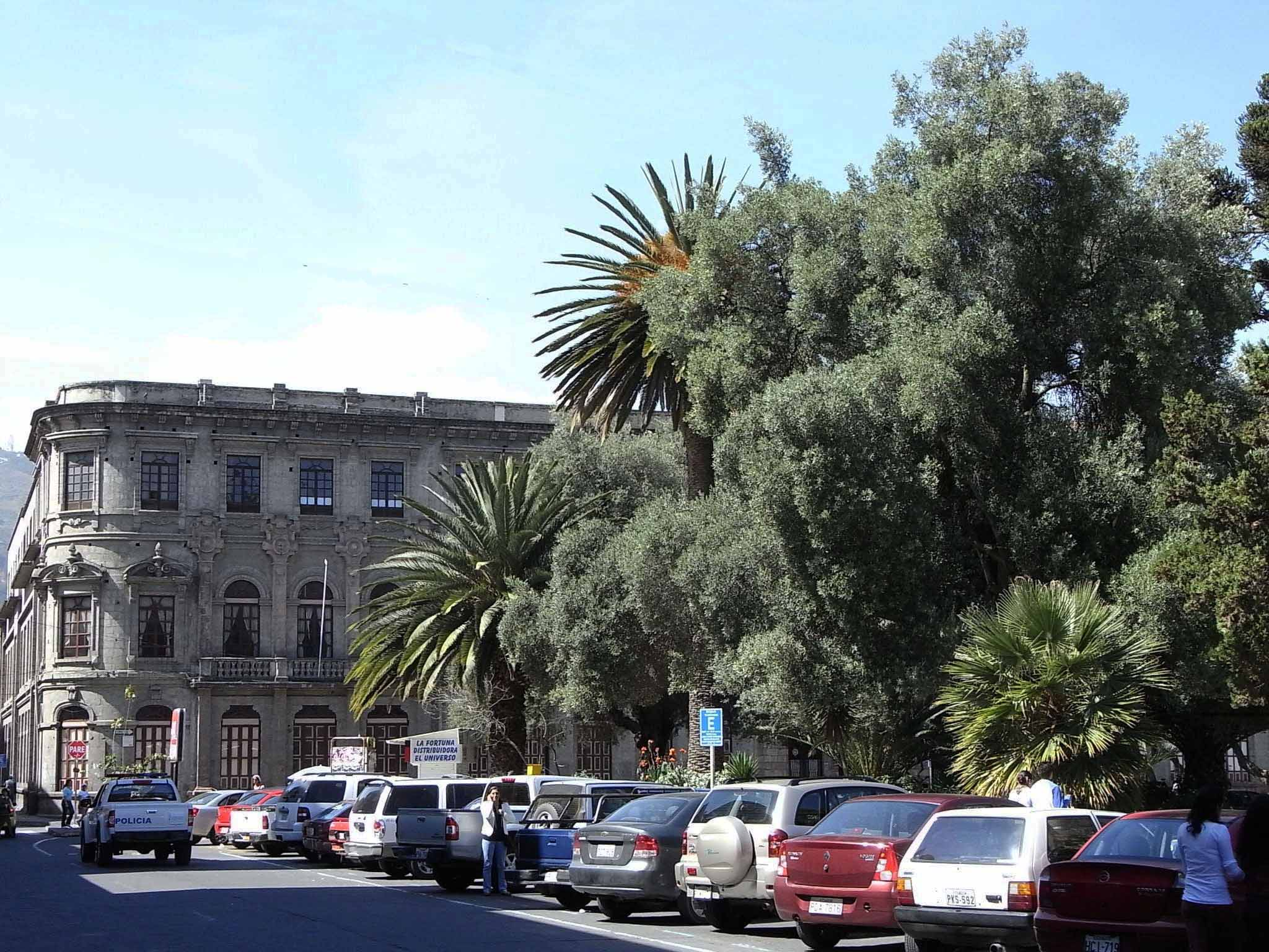 Panorámica desde calle Luis A. Martínez